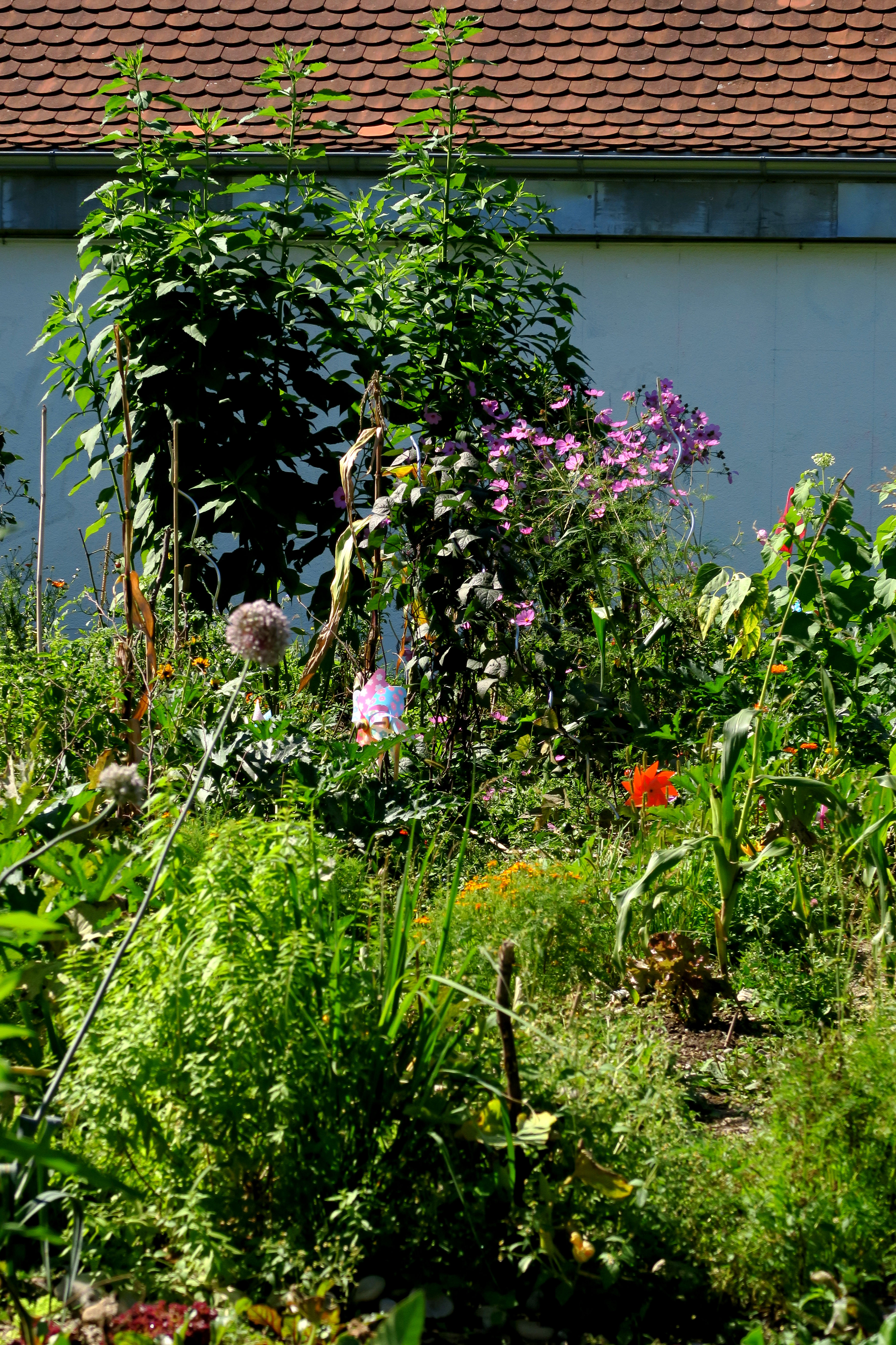 Gartenmischkultur in der Parzelle von Green City e.V. in den Themengärten an der Sachsenstraße, mit Mais, Bohnen, Zwiebel, Sonnenblumen etc.